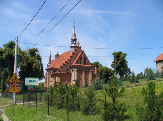 Kościół w Łapczycy